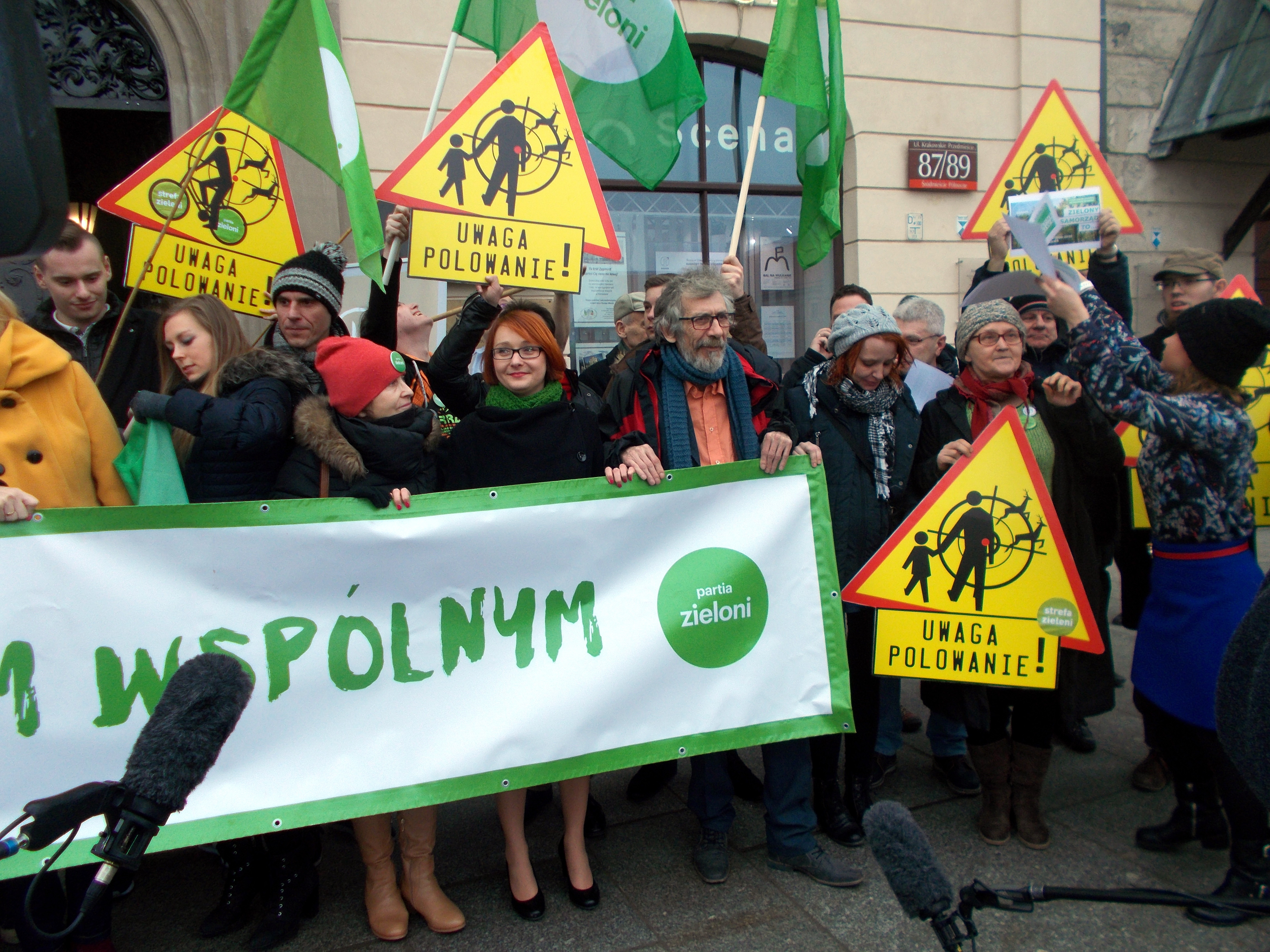 Event podczas kongresu Partii Zieloni w Warszawie w lutym 2018 r.